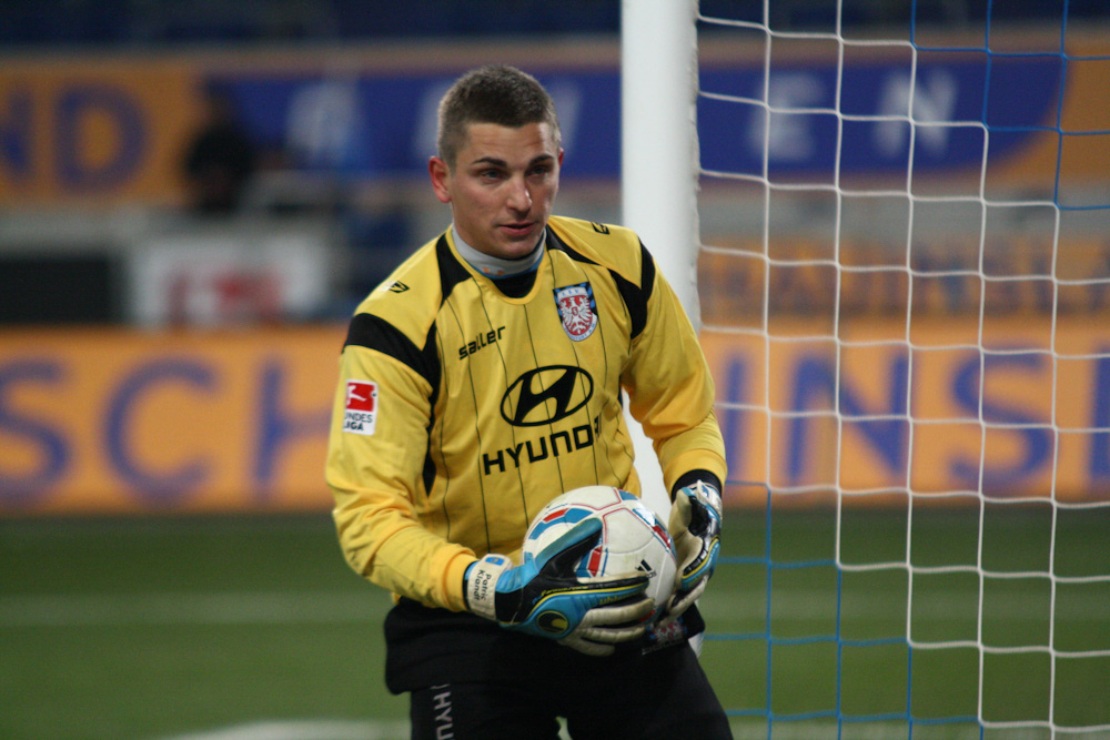 Patric Klandt, FSV Frankfurt